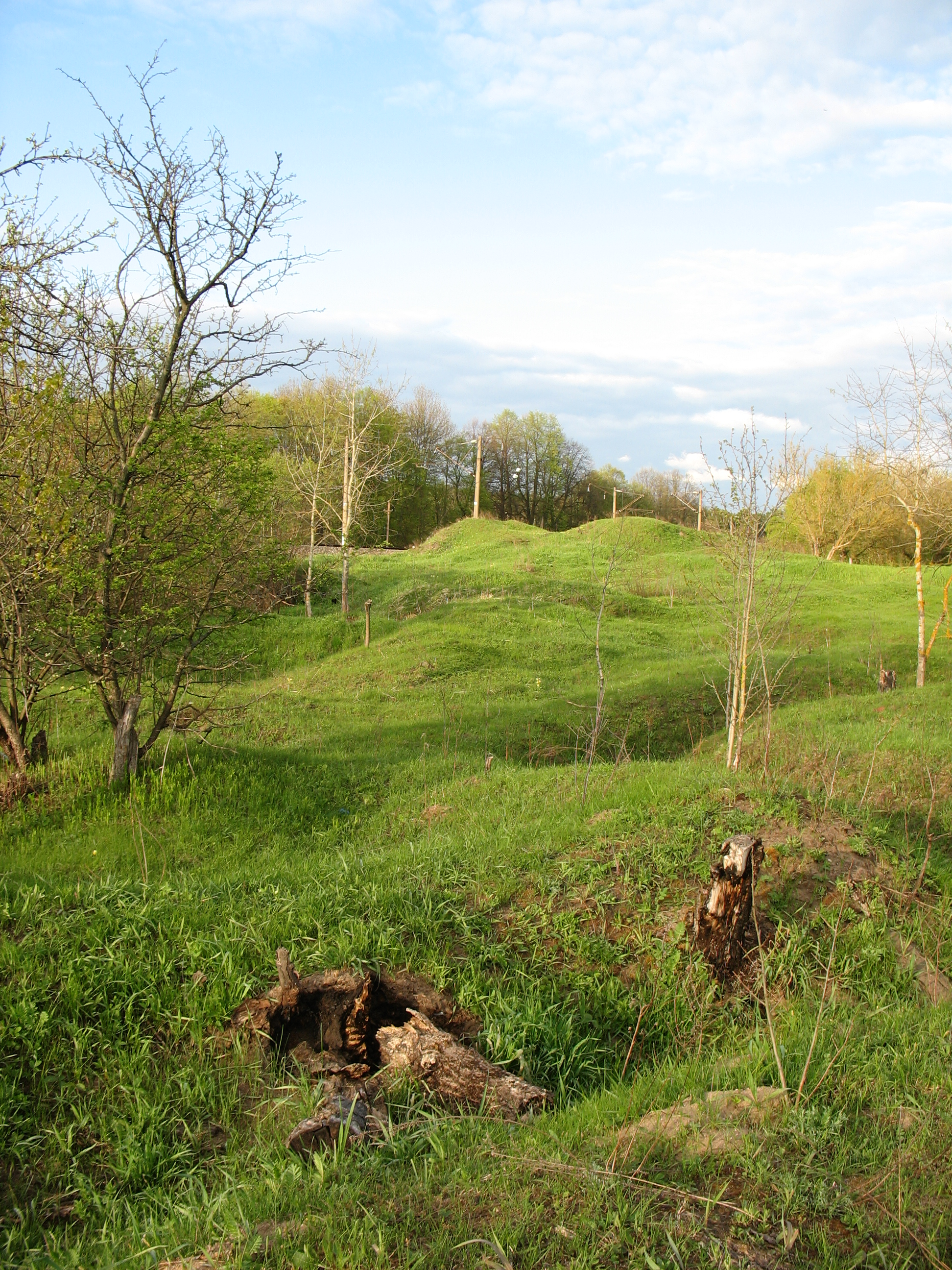 Древнее гнёздовское городище